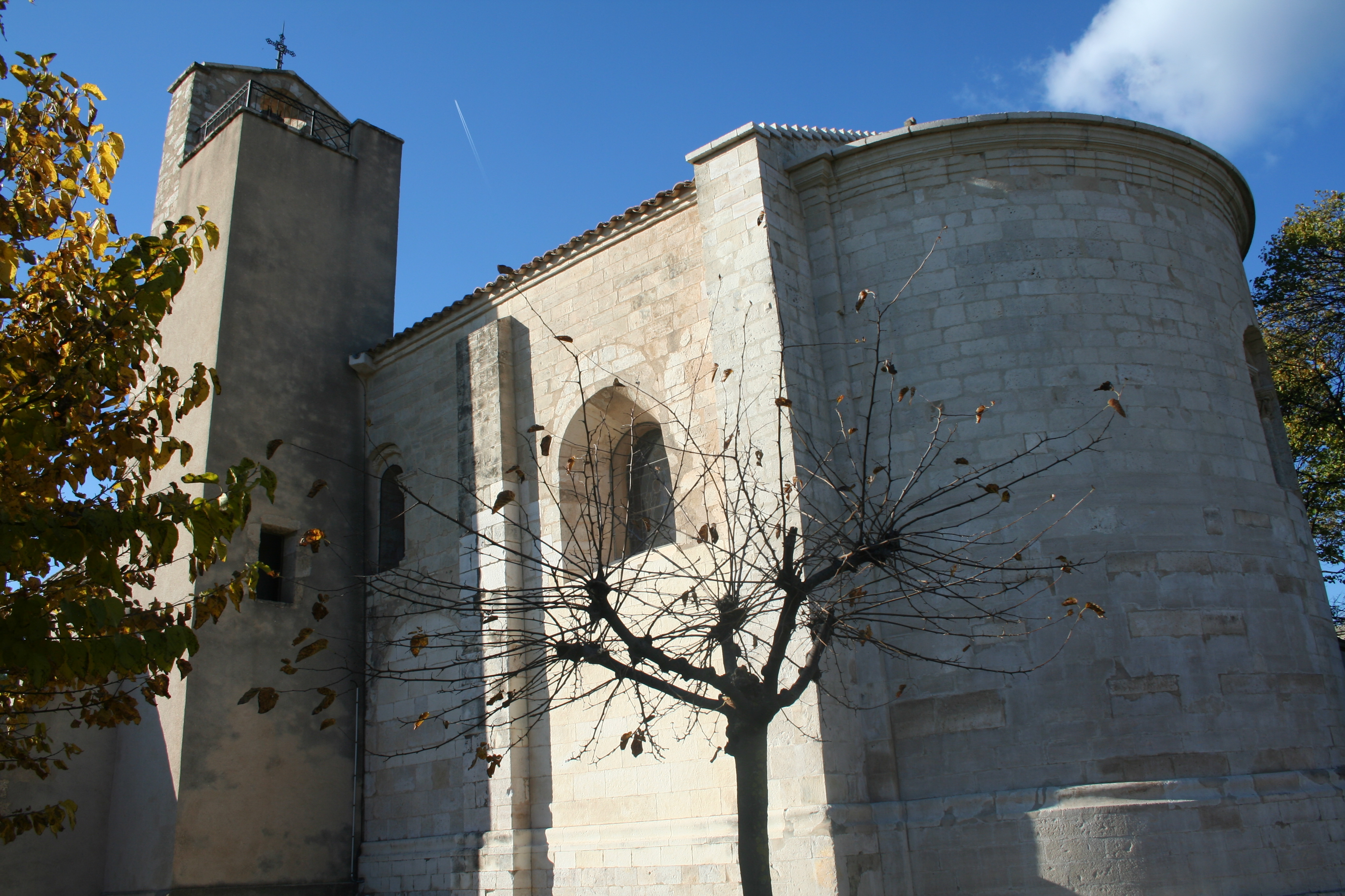 Assas (Hérault) - église Saint-Martial.